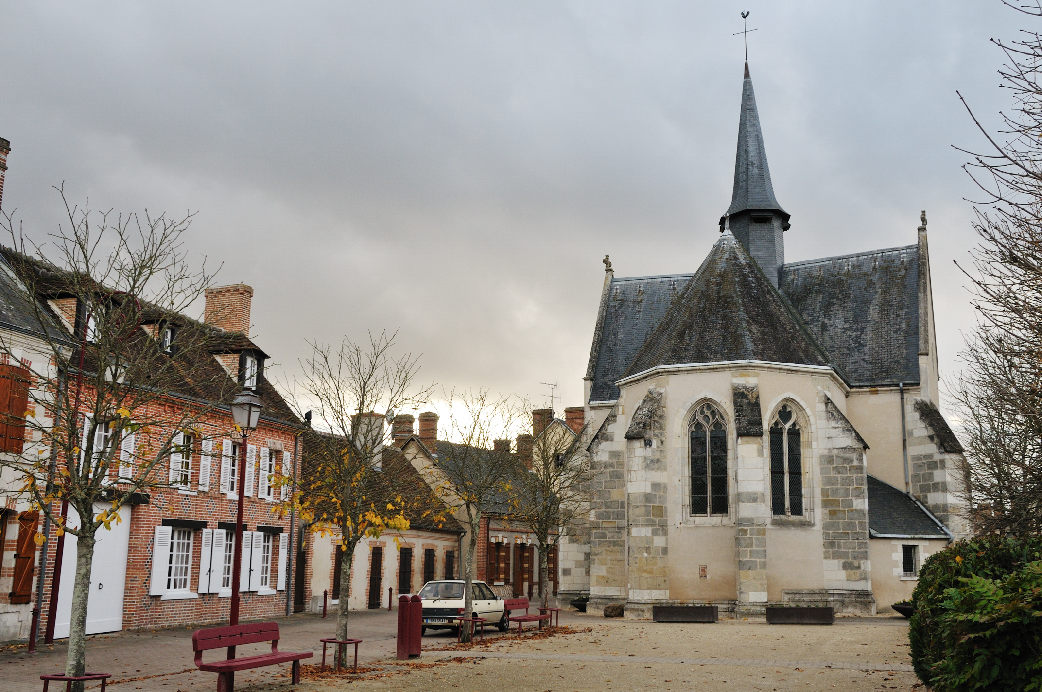 Chapelle Saint-Genouph, Selles-Saint-Denis, Loir-et-Cher, France .